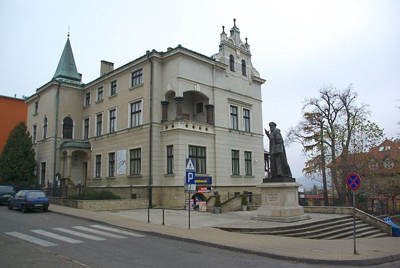 Public Library Sanok 2011 and Grzegorz z Sanoka Monument